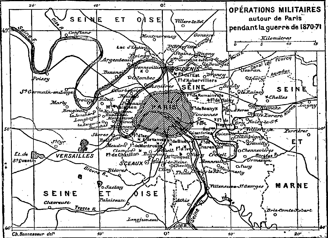 Opérations militaires autour de Paris pendant la guerre de 1870-1871